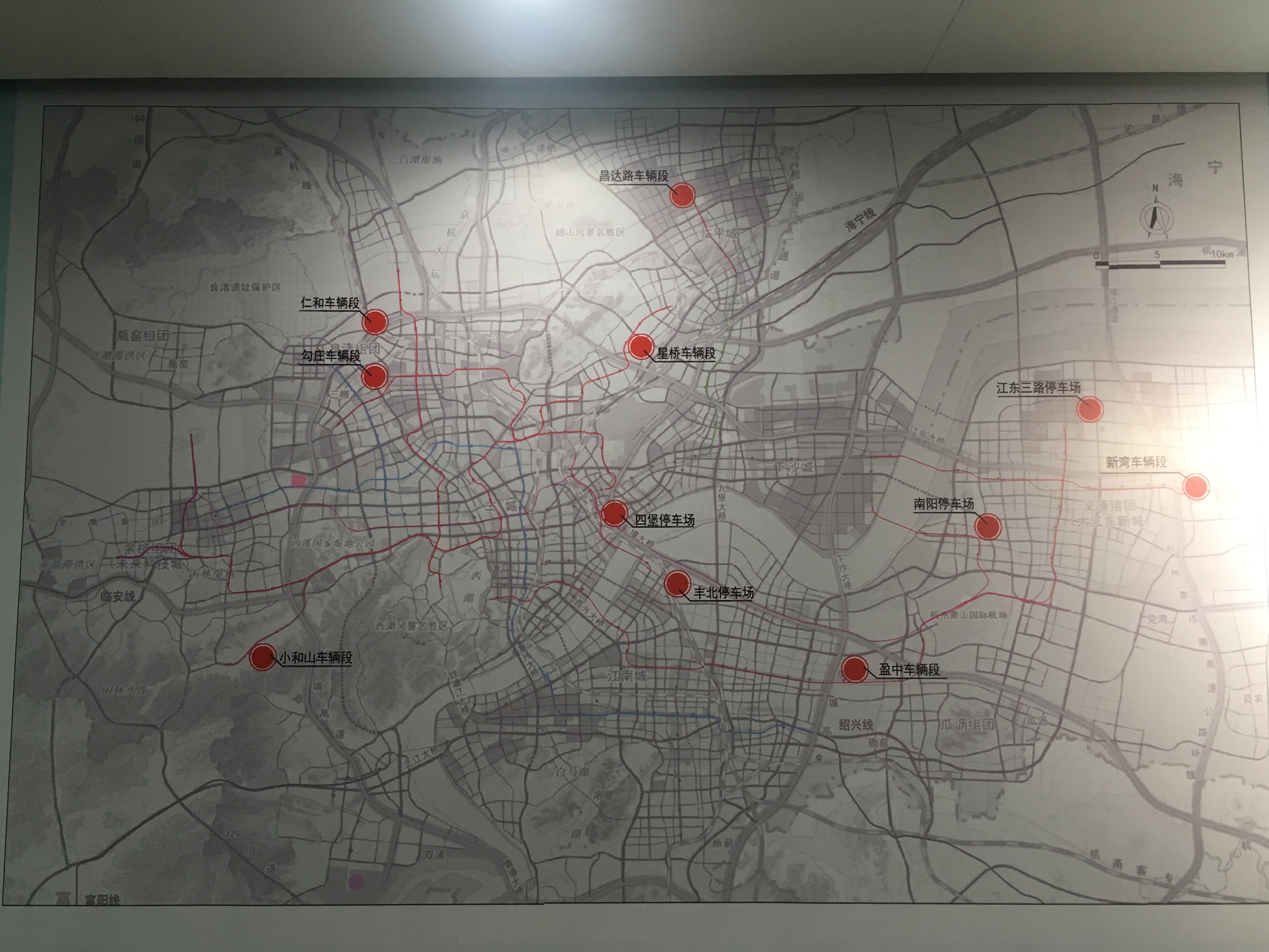 杭州地铁新建车辆段场示意图